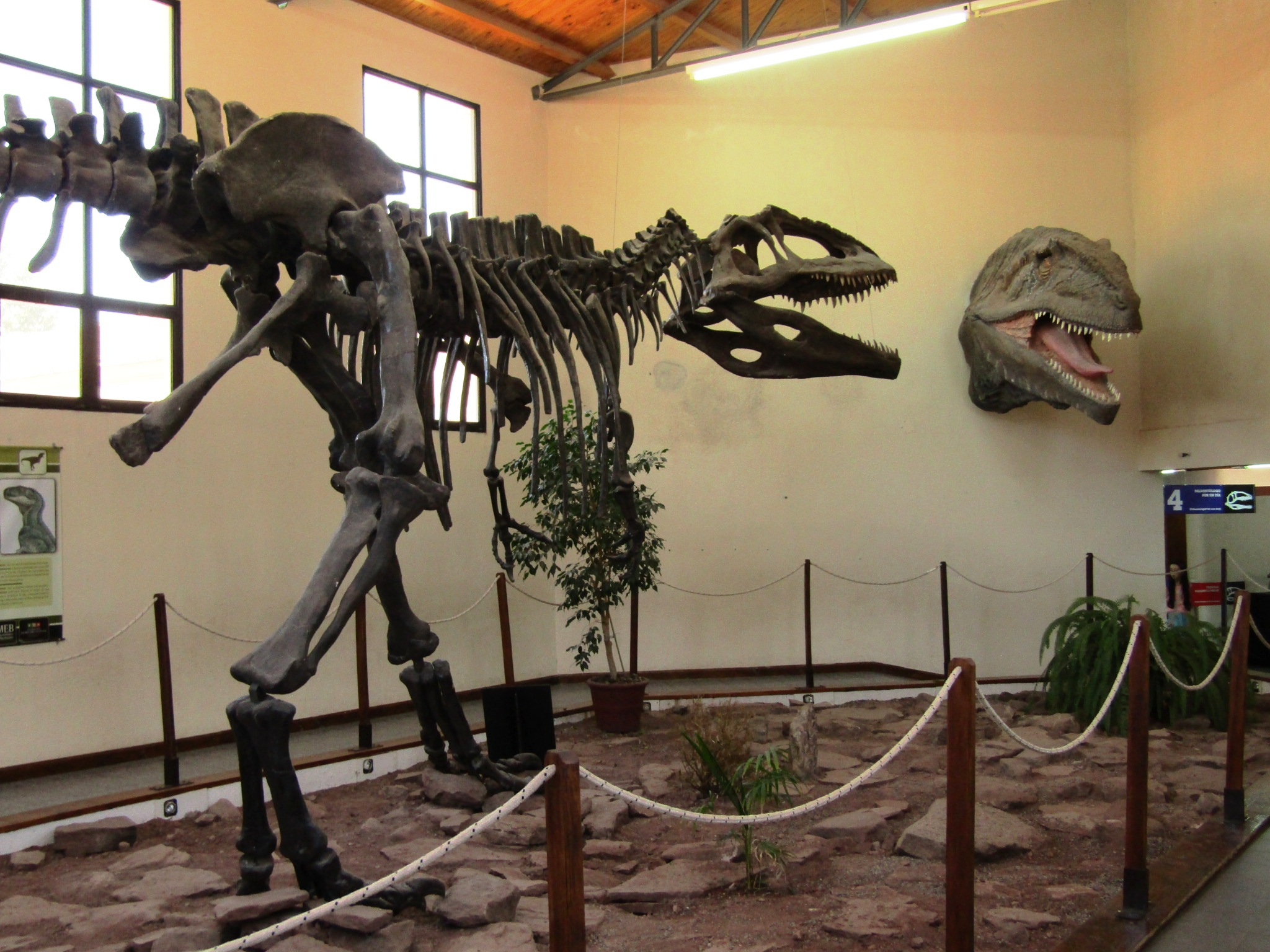 Giganotosaurus reconstrucción esquelética a la izquierda y a la derecha la recreación en vida de su cabeza y cuello.